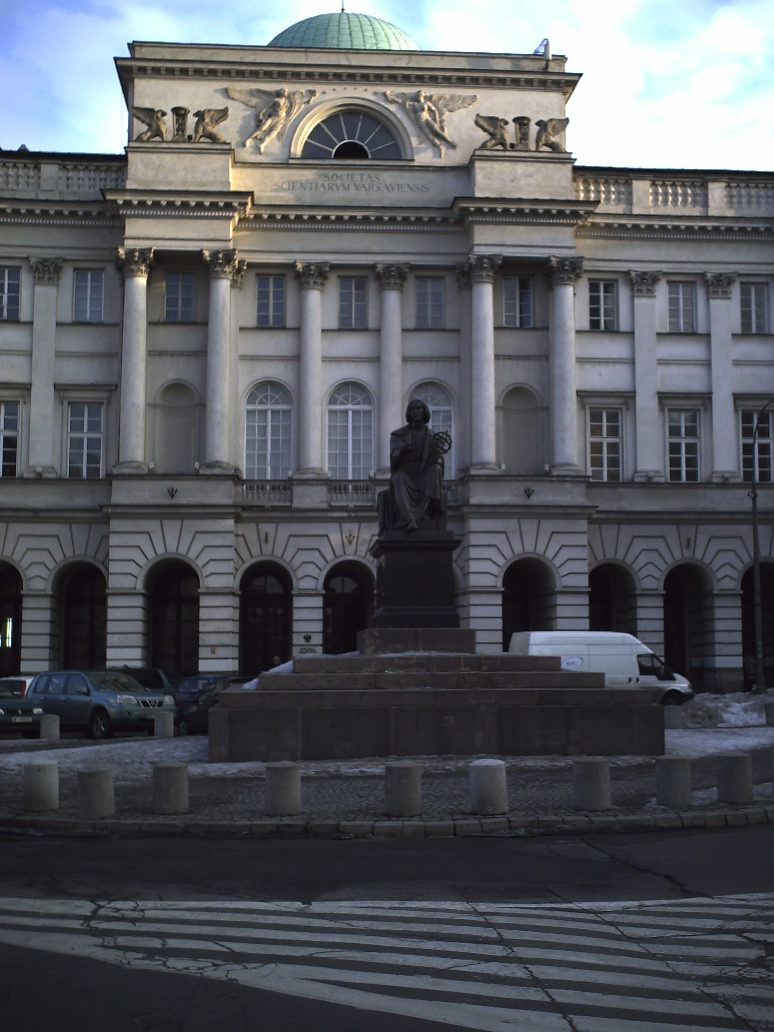 Pomnik Mikołaja Kopernika, ulica Krakowskie Przedmieście, Warszawa. W tyle Pałac Staszica, siedziba Polskiej Akademii Nauk.